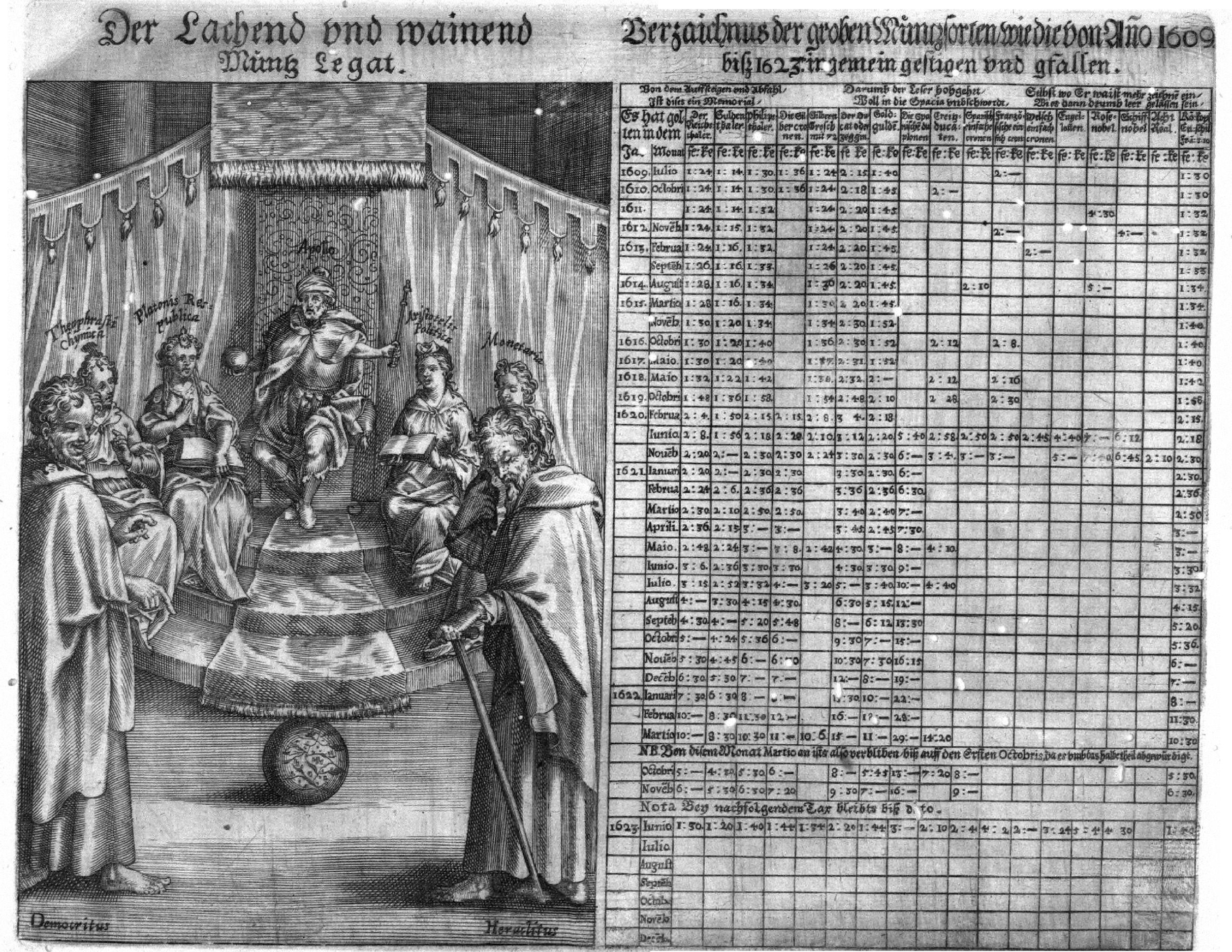 Einblattdruck mit der Darstellung des Währungsverfalls während der der Kipper- und Wipper-Zeit